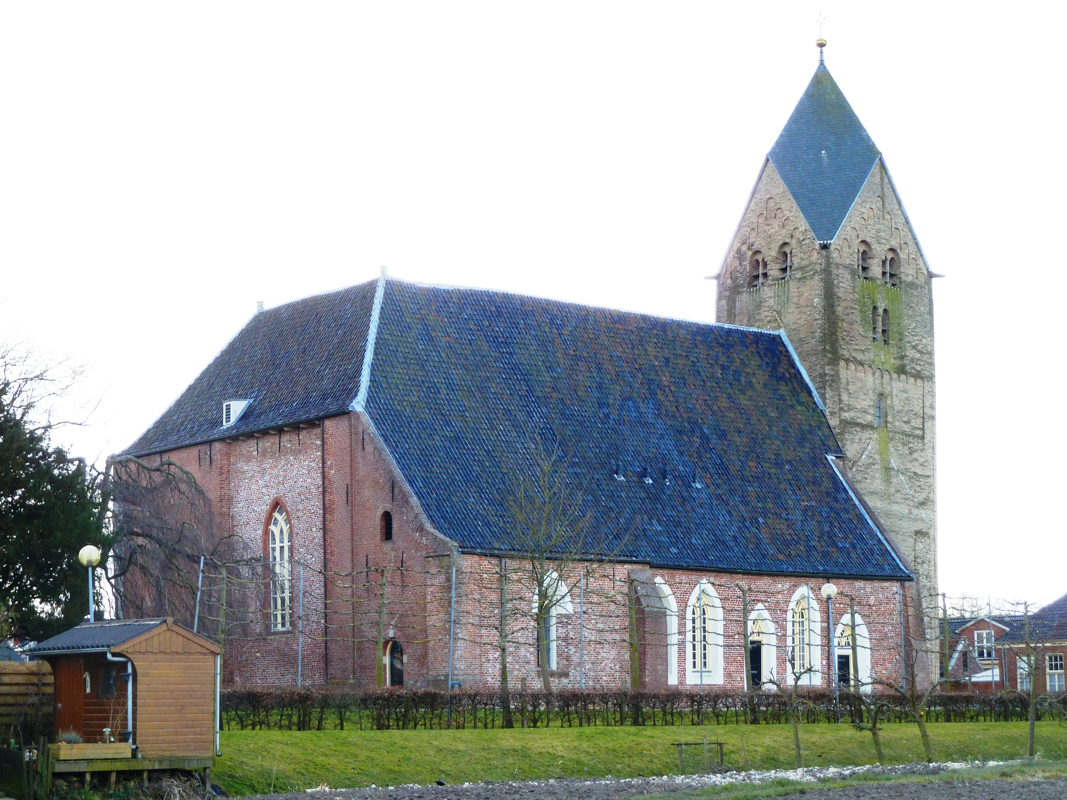 Walfriduskerk in Bedum.